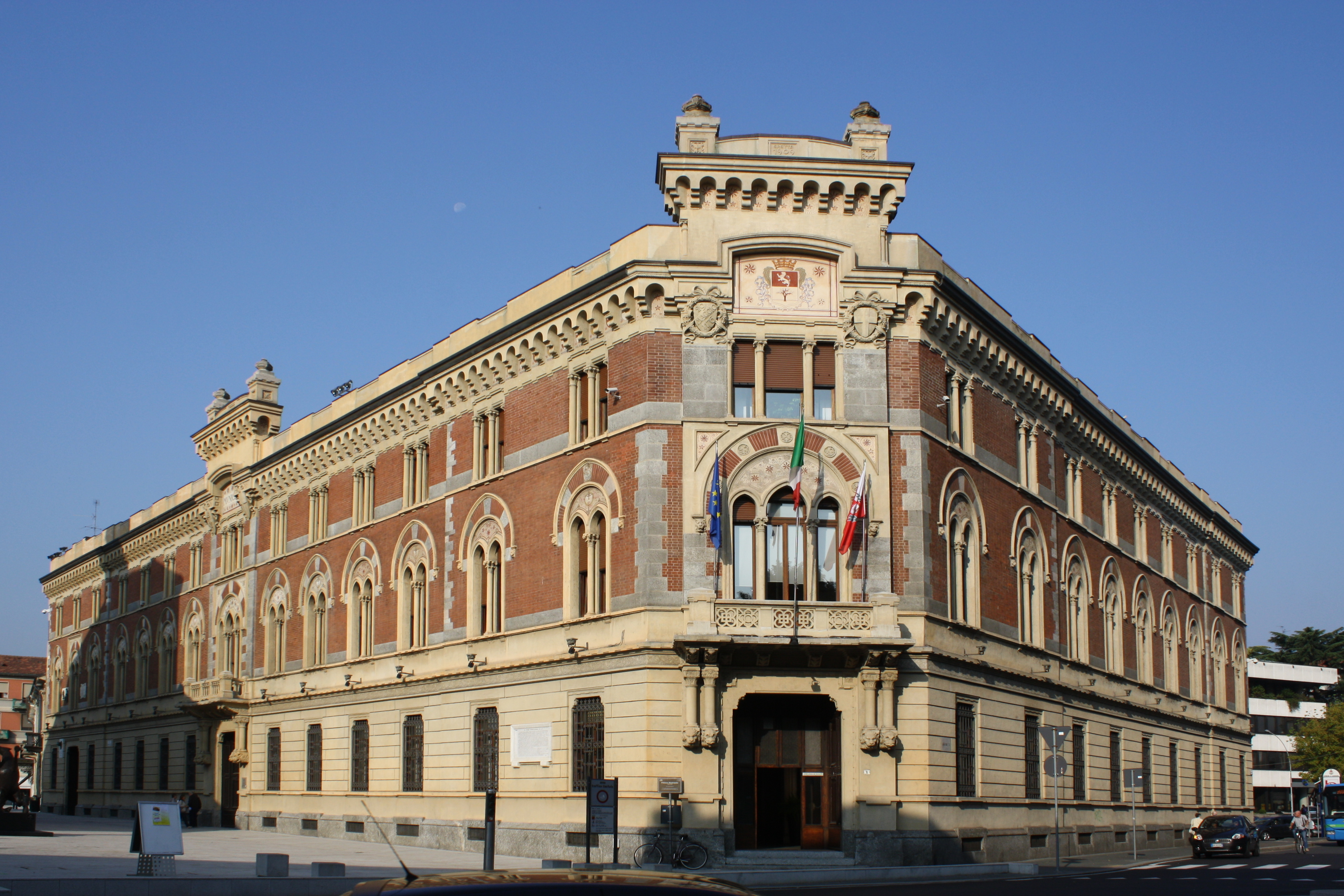 Palazzo Malinverni, sede del Municipio di Legnano This is a photo of a monument which is part of cultural heritage of Italy.